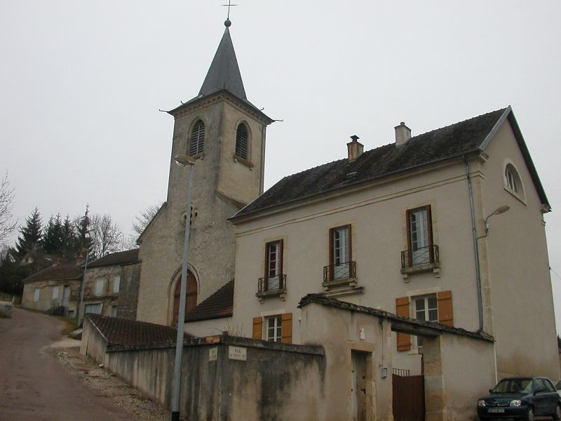 église de Val Suzon 21